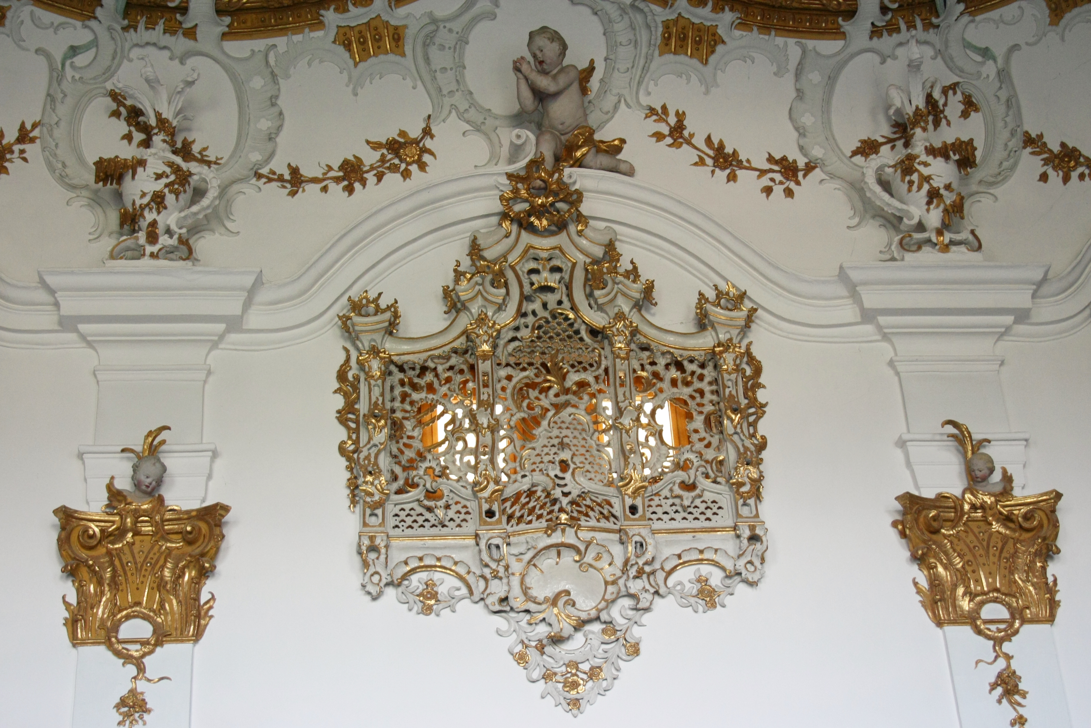 Klosterkirche Maria Medingen (Mariä Himmelfahrt) in Mödingen (Landkreis Dillingen an der Donau) des ehemaligen Dominikanerinnenklosters (heute Provinz Maria Medingen der Dillinger Franziskanerinnen), Oratorium in der Ebnerkapelle, Stuck von Anton Landes von 1755